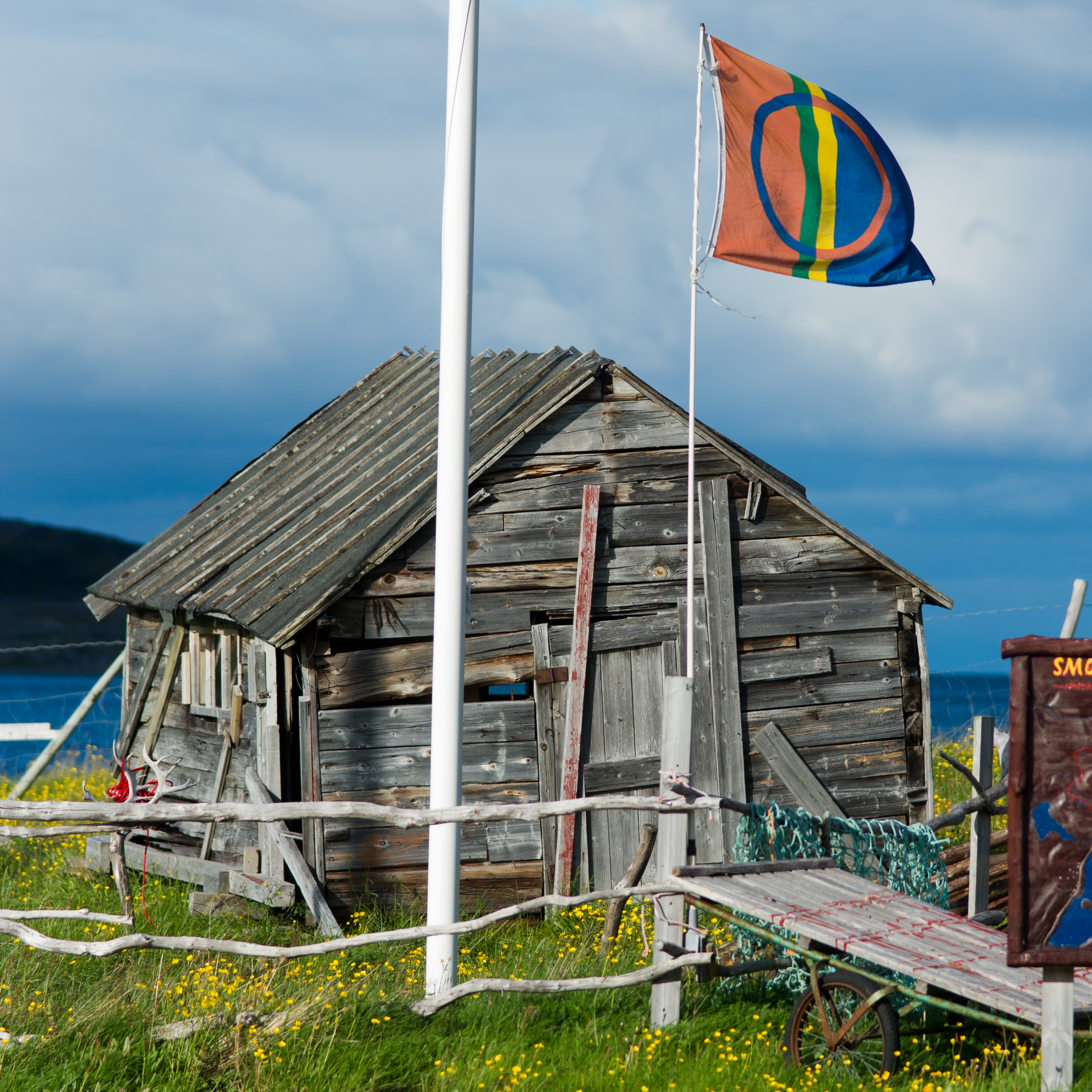 Cabane en Laponie